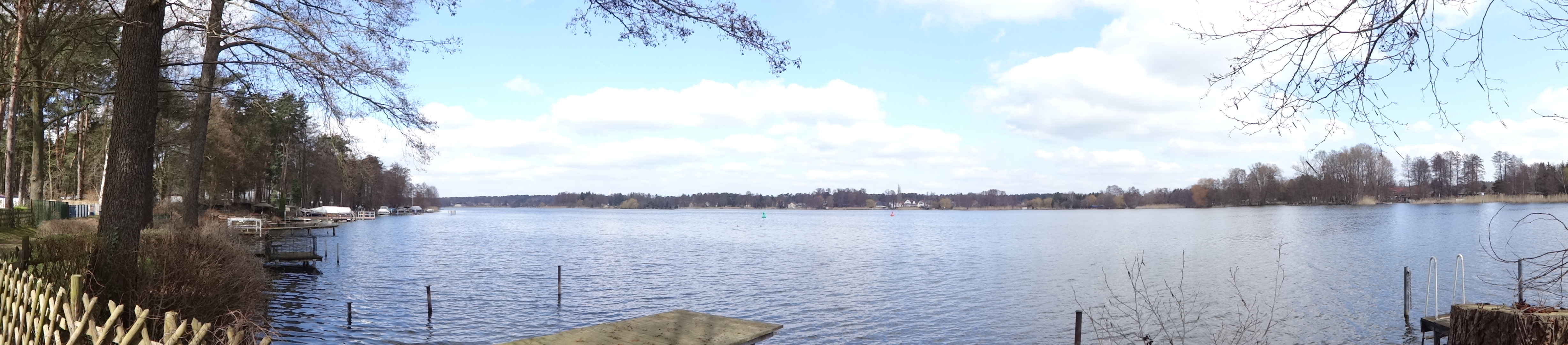 Krüpelsee, ein Binnensee im Landkreis Dahme-Spreewald in Brandenburg in der Nähe von Königs Wusterhausen